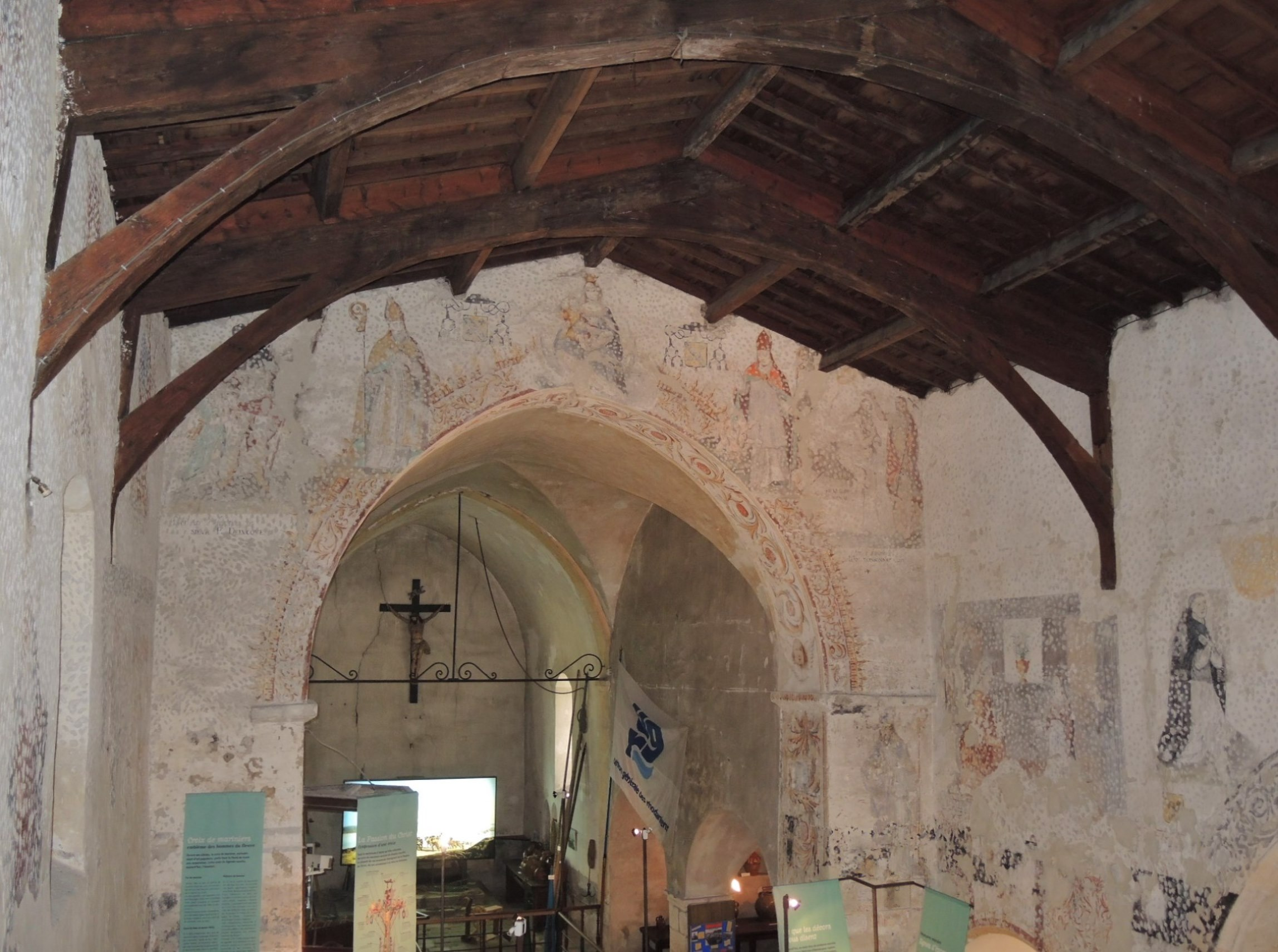 Serrières (Ardèche) détail